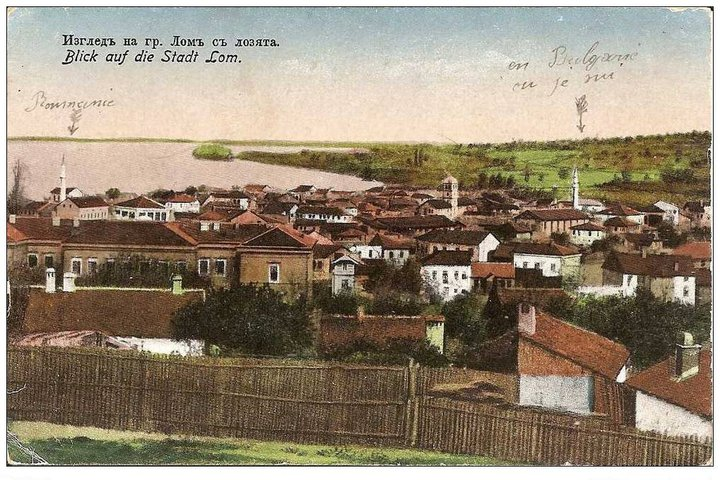 Лом снимка